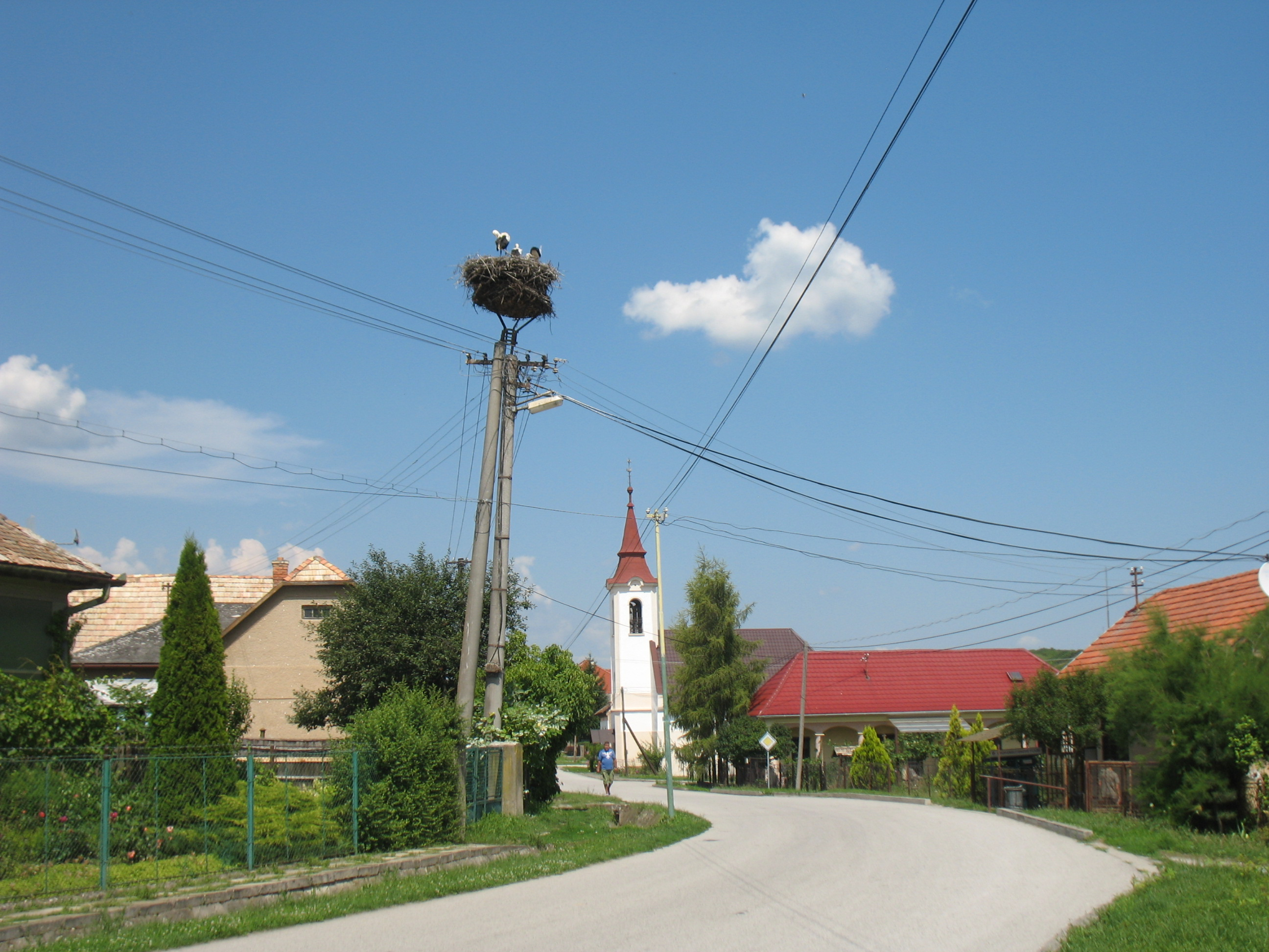 Sajószentkirály